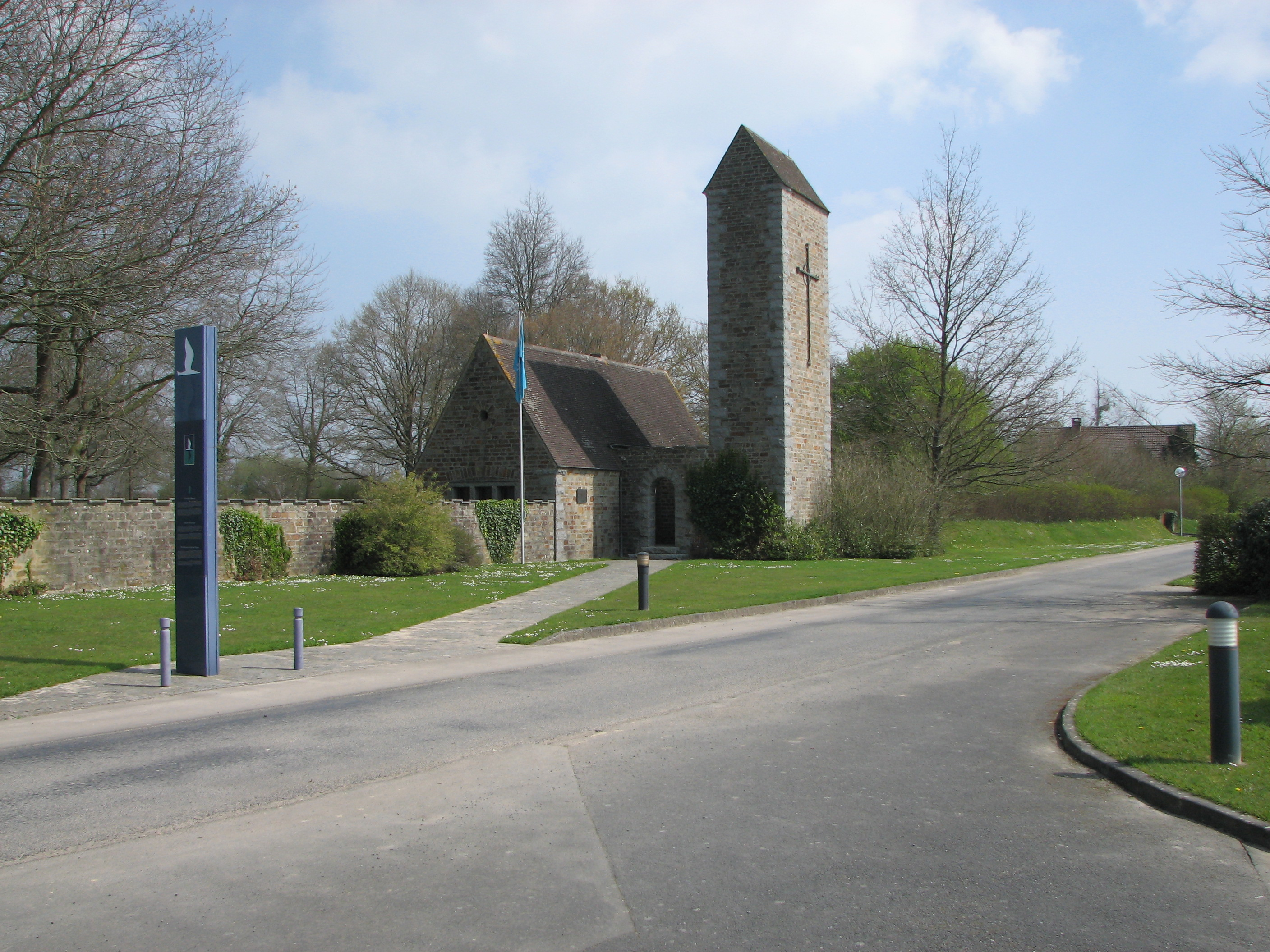 German Military Graveyard of Marigny (Normandy), entrance building Cimetière militaire allemand de Marigny, monument à l'entrée